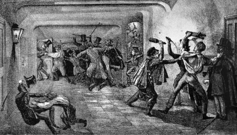 Slagsmål på Malmens källare (Södra stadshuskällaren). Den 30 oktober 1842 ubröt ett stort slagsmål mellan några officerare och ett antal gäster. När stadsvakten anlände var battaljen i fullgång och så våldsam att inte vågade ingripa. Istället drog de sig försiktigt tillbaka.